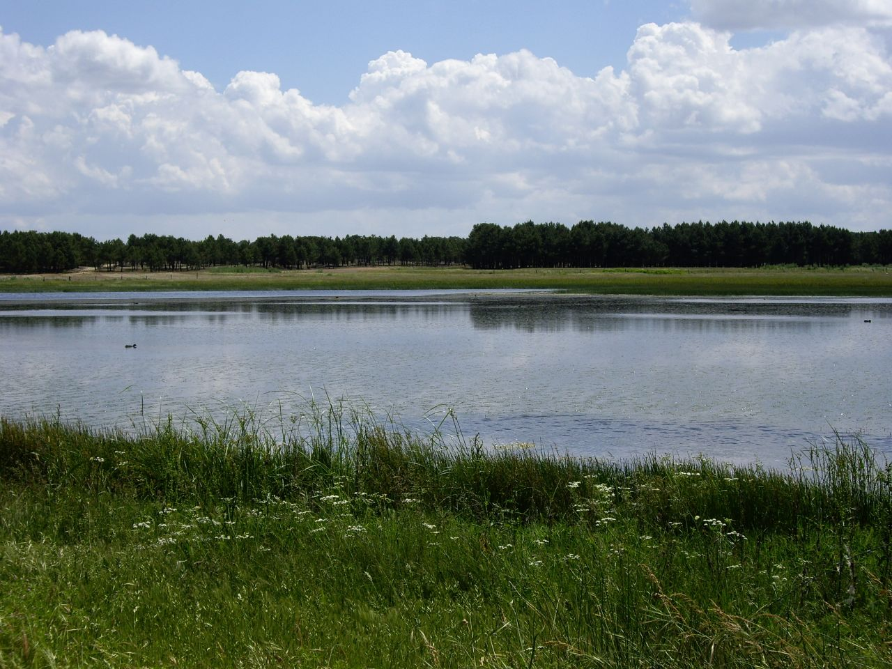 Lagunas de Cantalejo, provincia de Segovia, España.